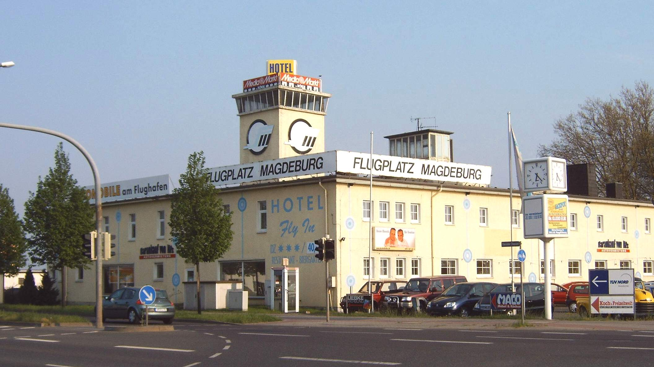 Flugplatz Magdeburg, Bild aufgenommen am 7.5.2006